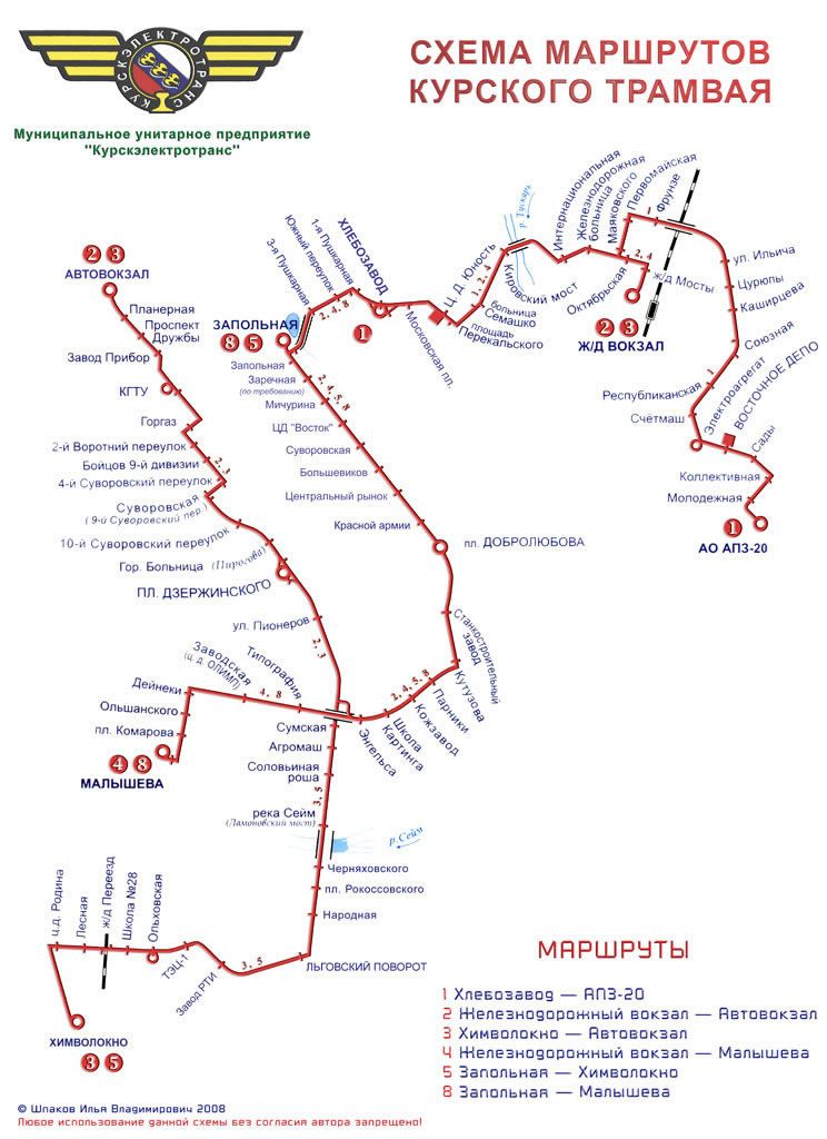 Карта трамвайных маршрутов в городе Курске на январь 2009 года.